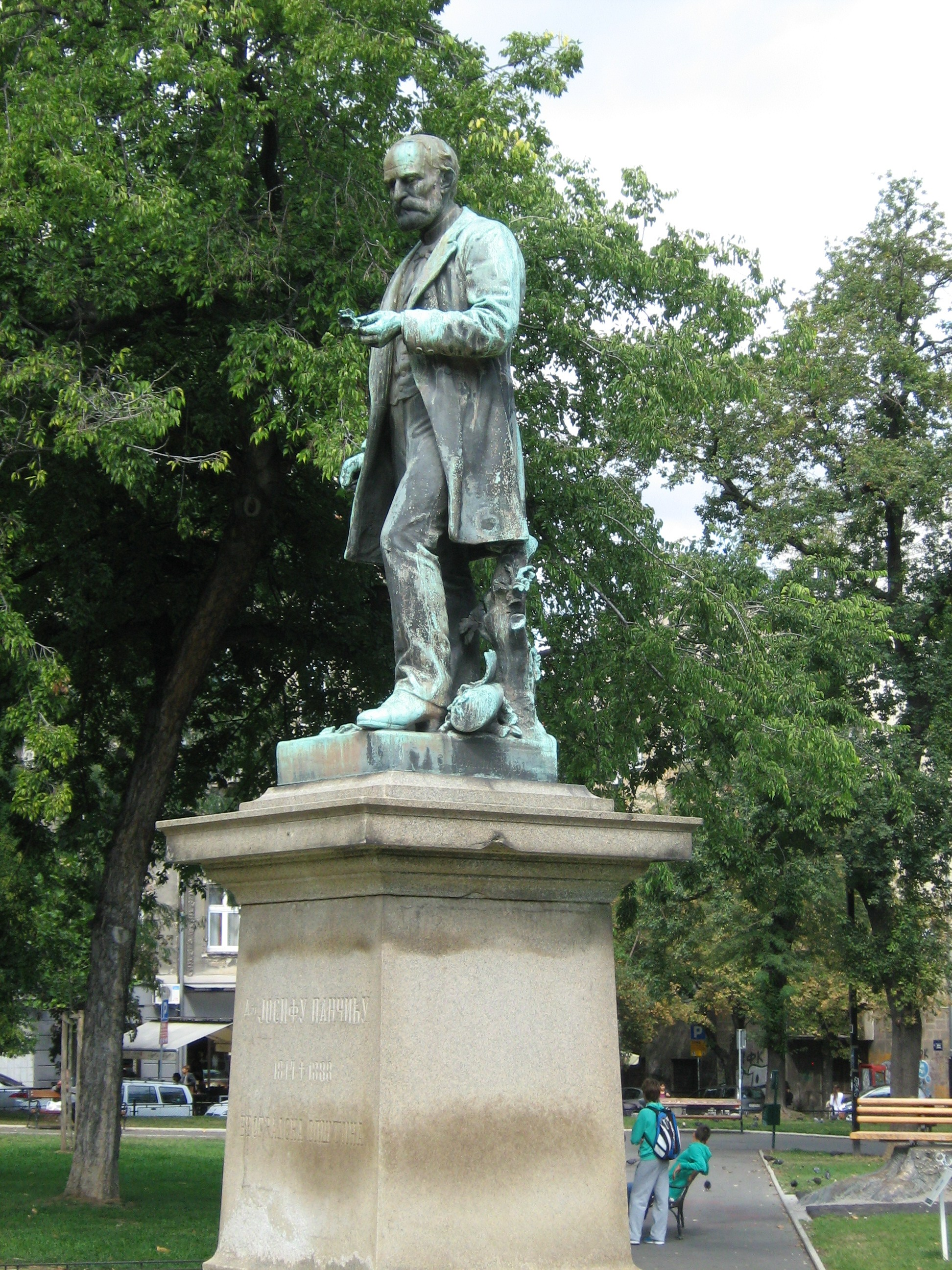 Споменик Јосифу Панчићу, Београд